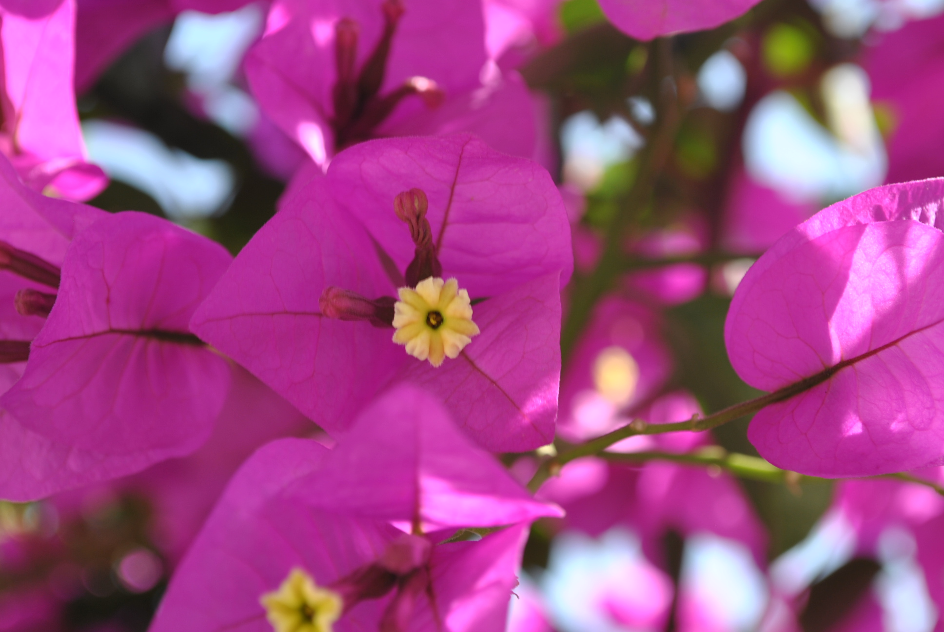 Flores de bugamvilia